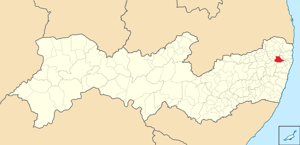 Mapa Paudalho